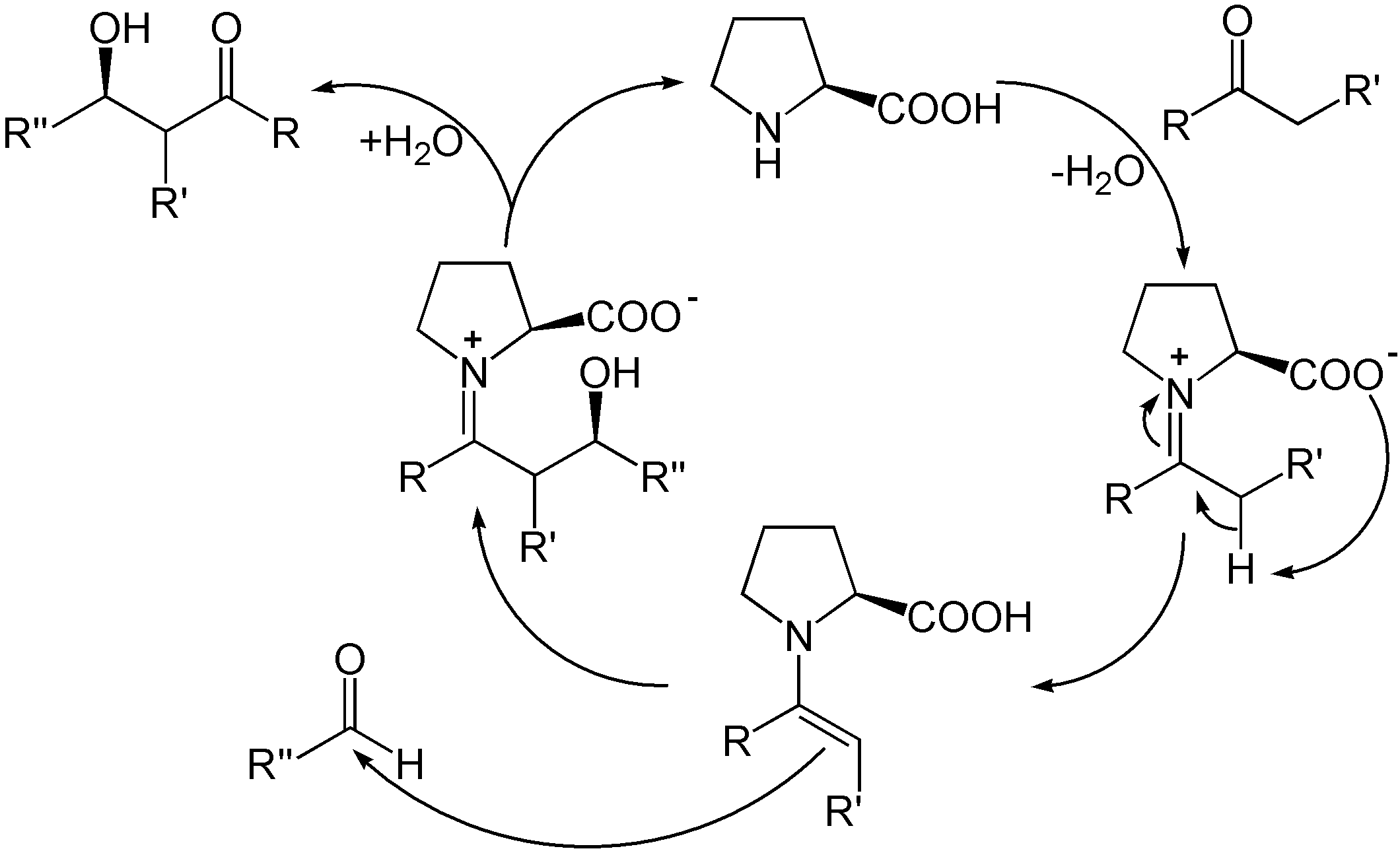 Mechanismus der organokatalytischen Aldolreaktion mit falscher absoluter Konfiguration des Endprodukts